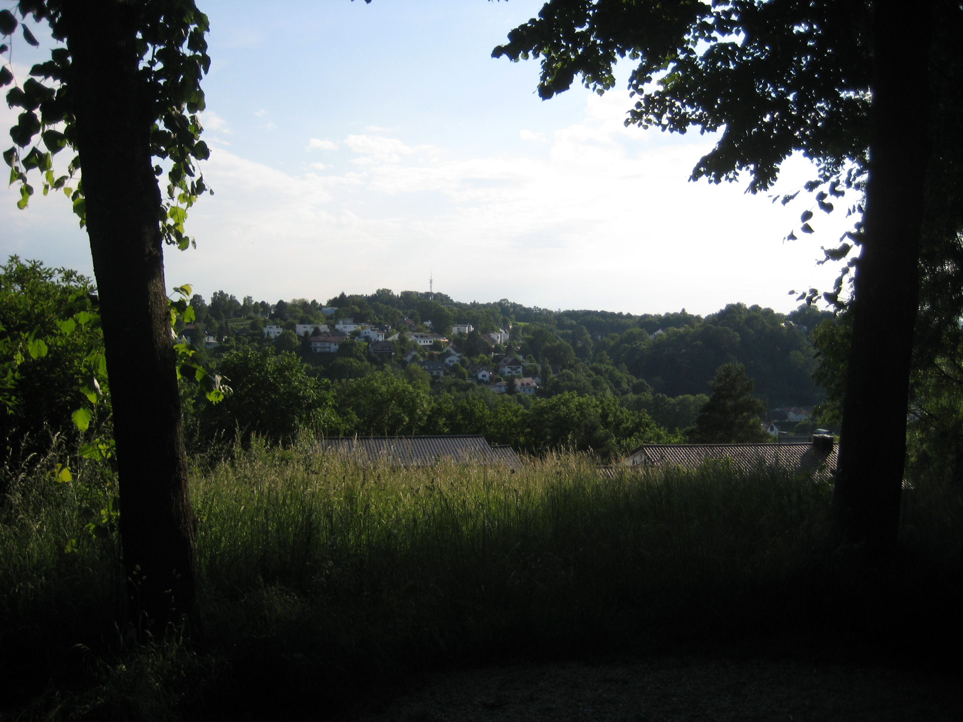 (LSG:BY-LSG-00333.01)_Schutz von Landschaftsteilen der Isar-Hangleiten am Annaberg